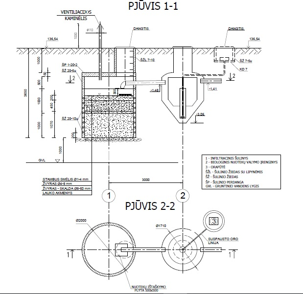 Biologinio valymo įrenginio ir infiltracijos šulinio principinė schema